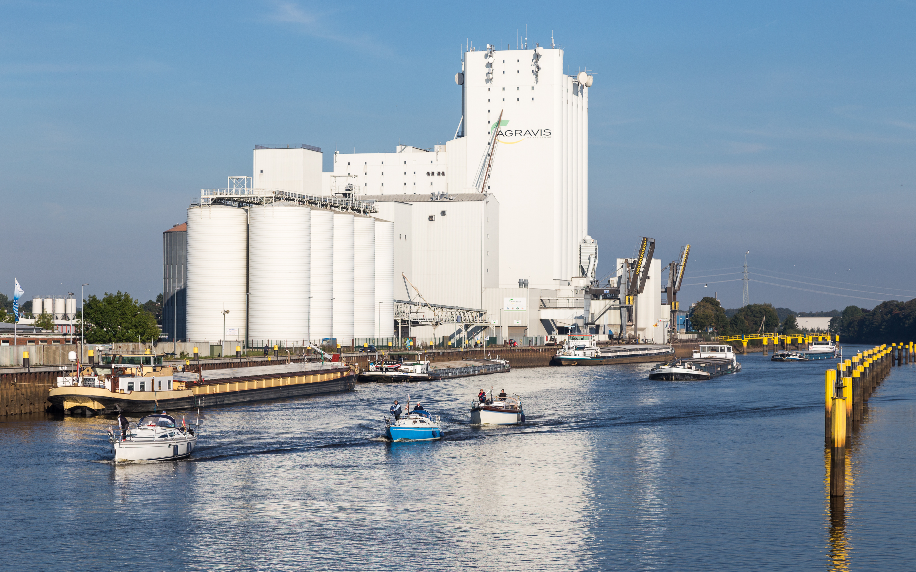 Der Oldenburger Nordhafen mit den Silos der Agravis Raiffeisen AG